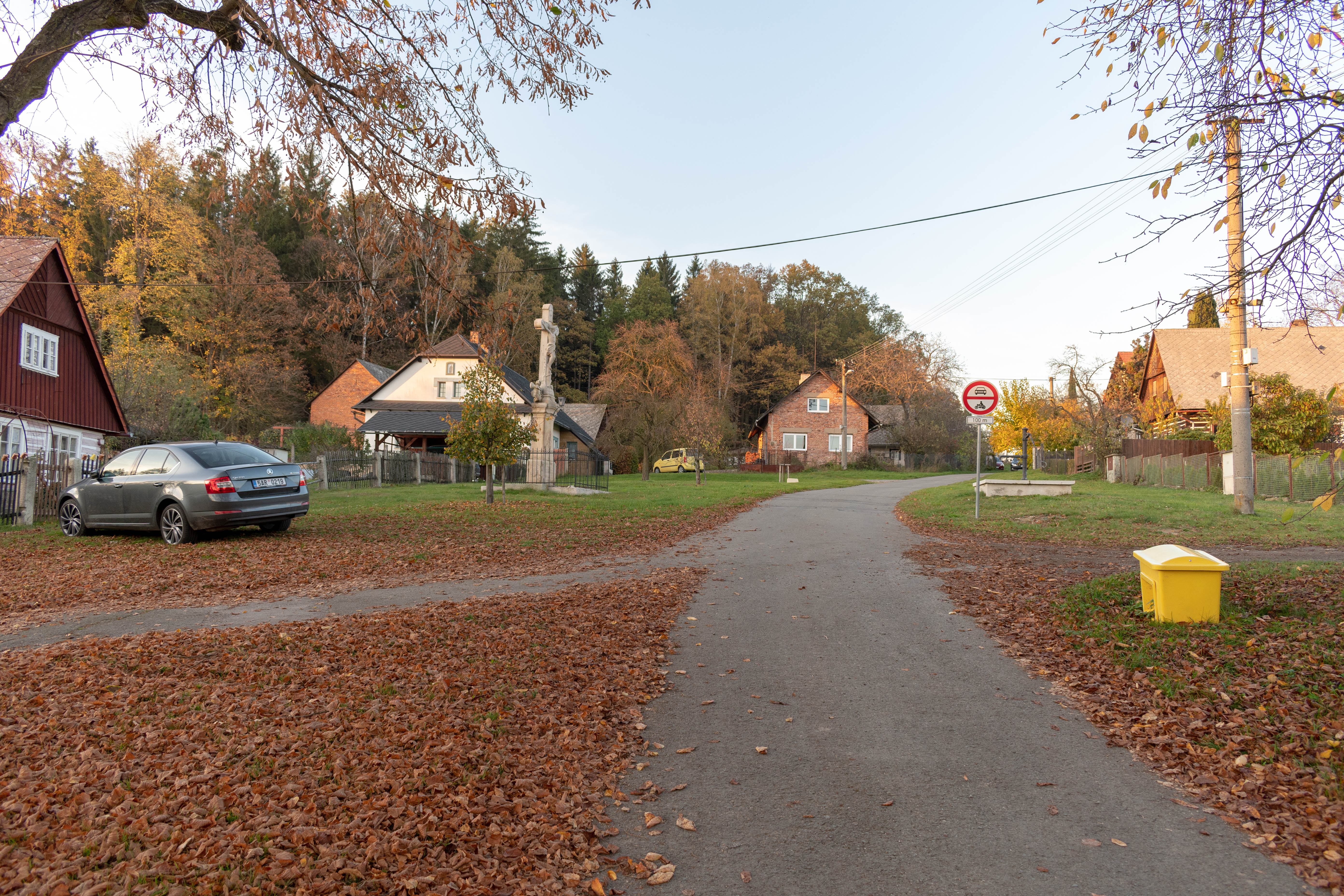 Celkový pohled na vesnici Bakov